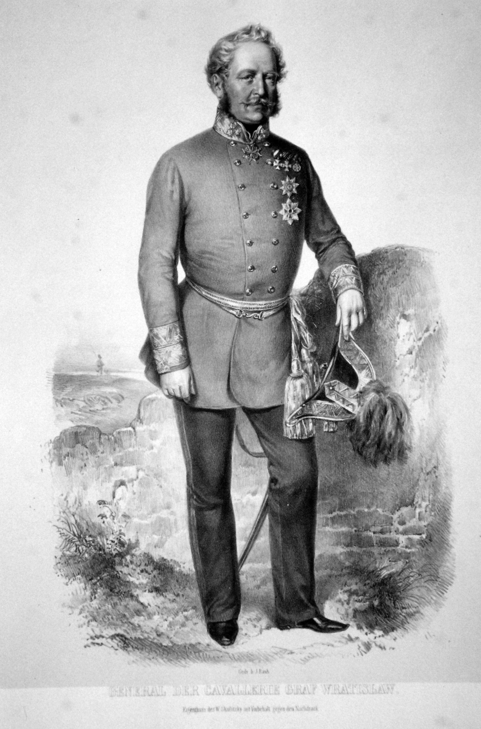 Eugen Graf Wratislaw von Mitrowitz-Nettolitzky (1786-1867)k. k. General der Kavallerie. Lithographie von August Strixnerr, um 1848